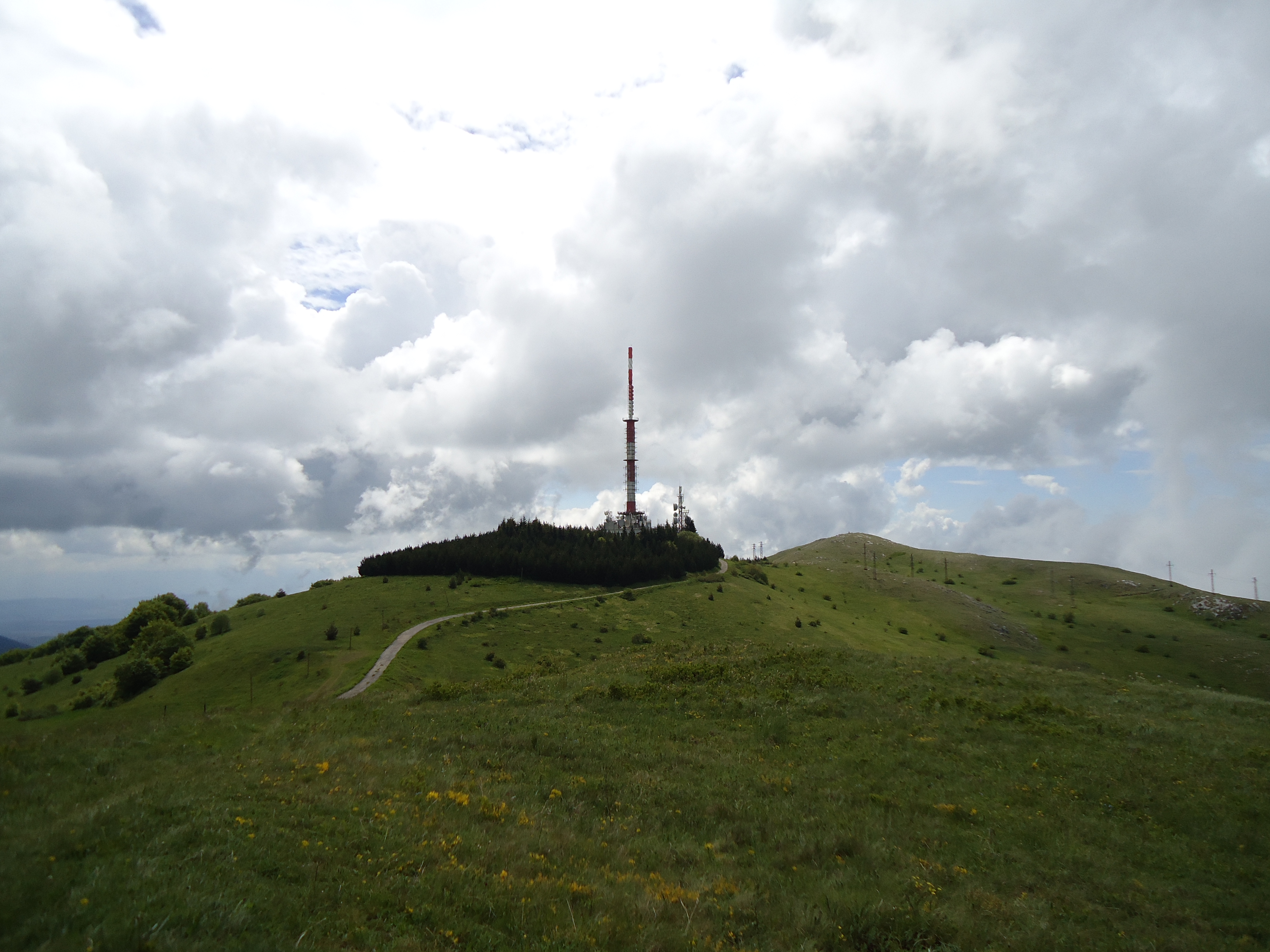 Конявска планина - връх Виден